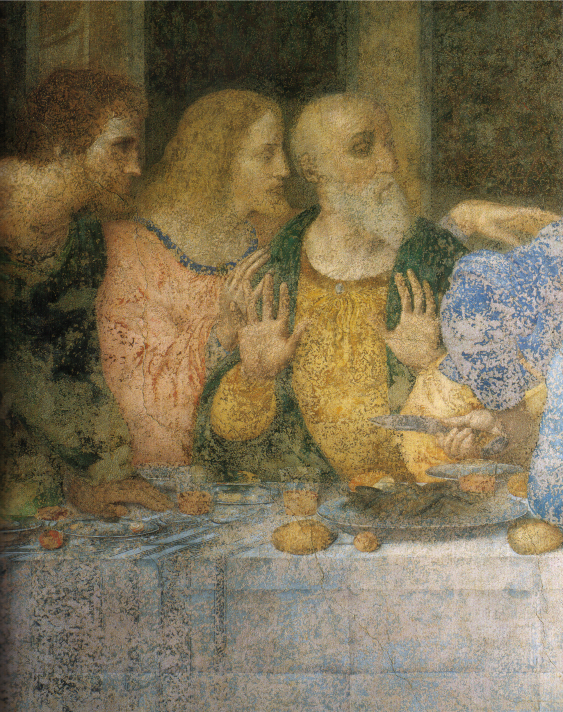 LEONARDO da Vinci The Last Supper Mixed technique, 460 x 880 cm Convent of Santa Maria delle Grazie, Milan